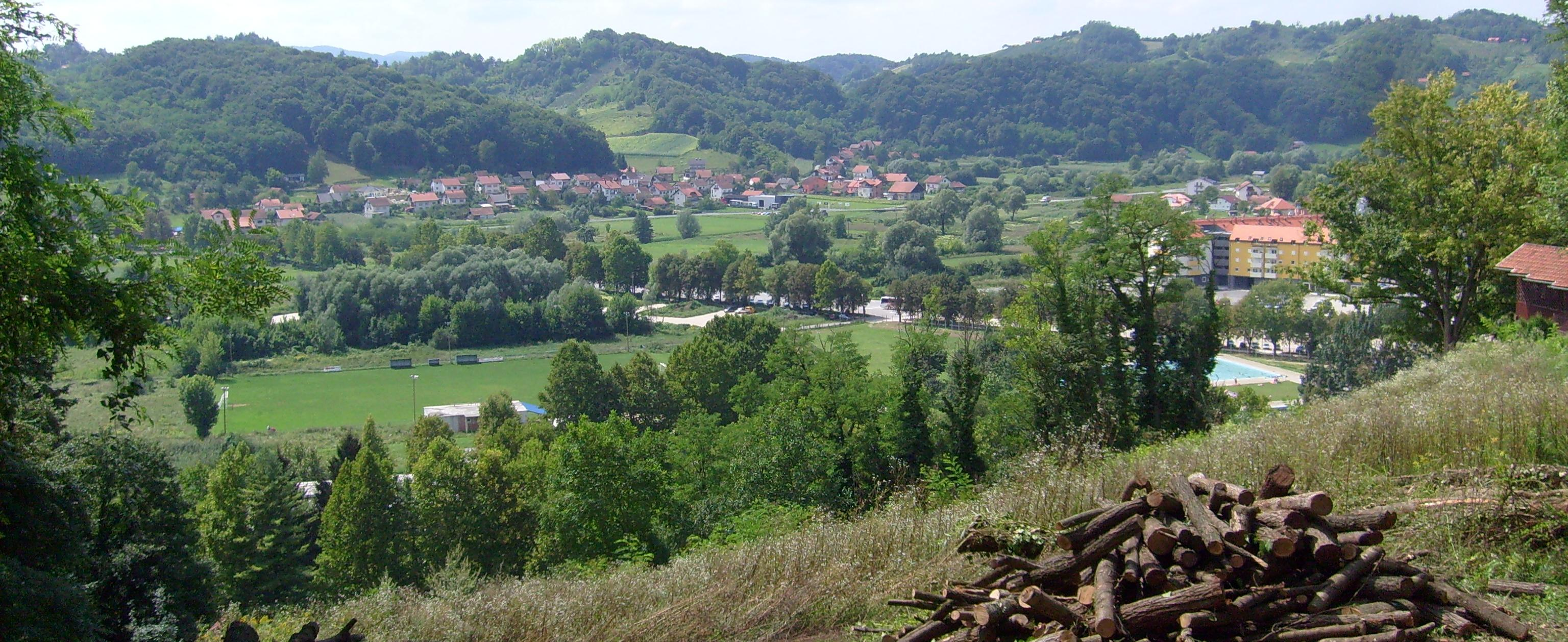 18.08.2010. _ Krapinske Toplice